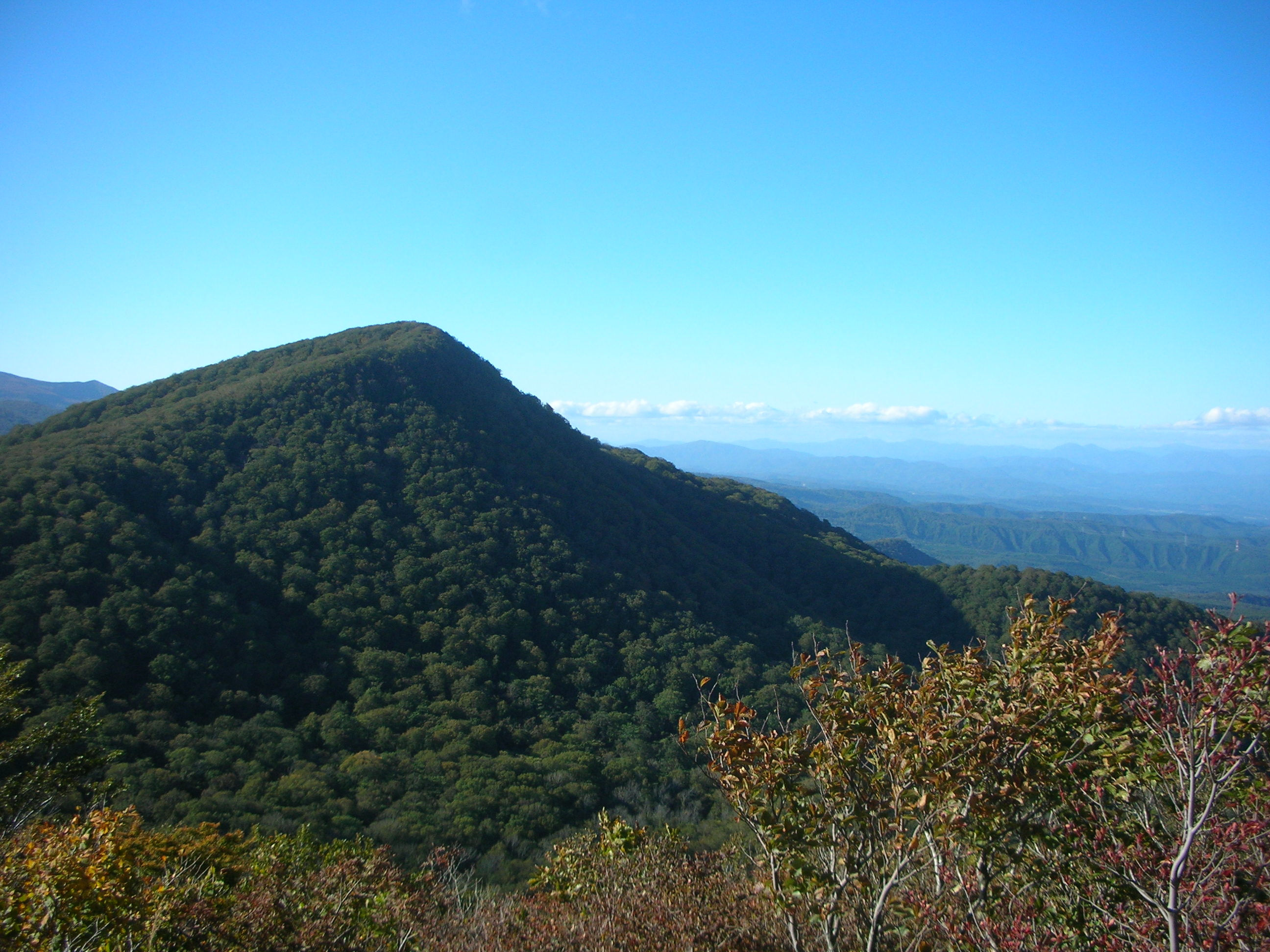 北泉ヶ岳 2015.9.30